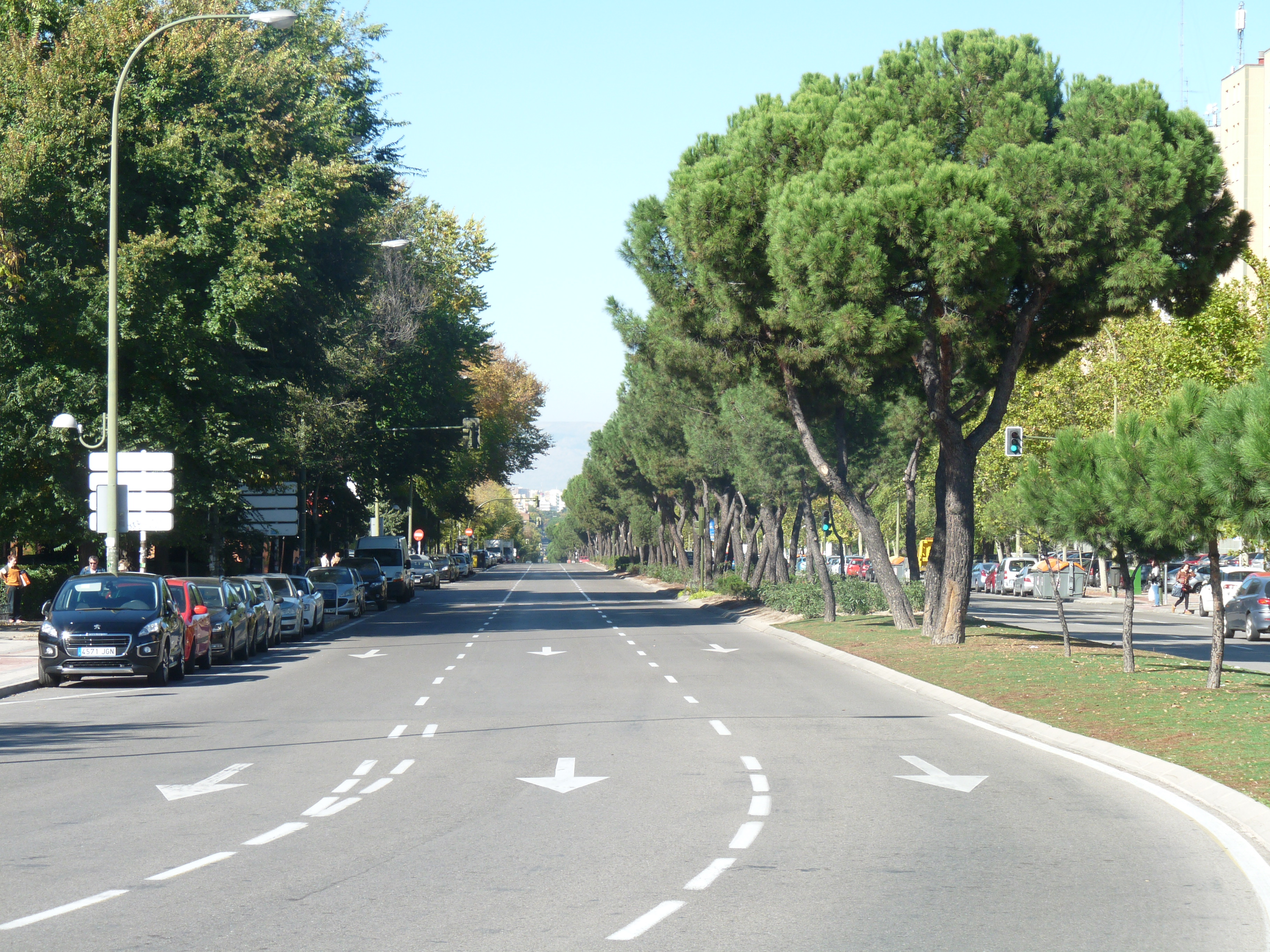 Calle de los Hermanos García Noblejas, Madrid.